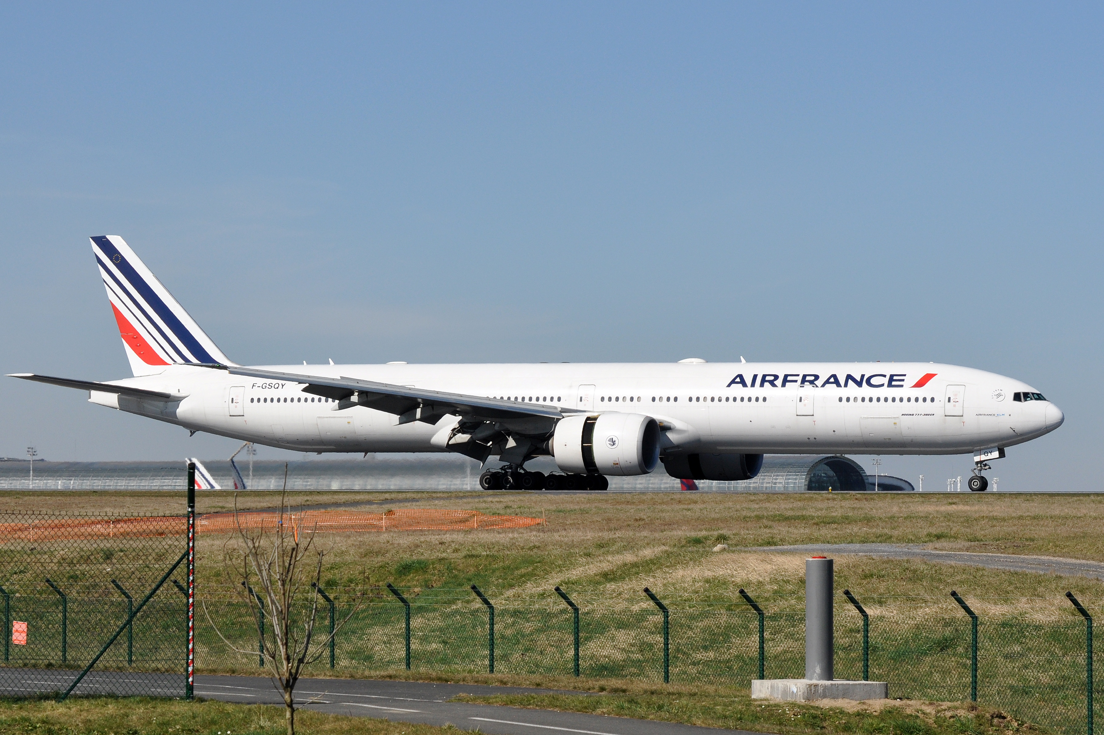 MSN 35678 LN 647 B777-328ER AIR FRANCE CDG AIRPORT